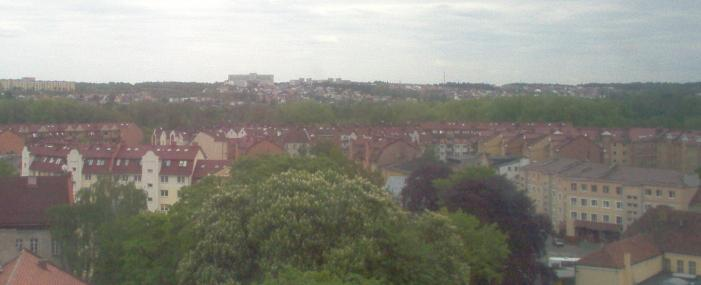 Słupsk - osiedle Nadrzecze widziane od strony Śródmieścia